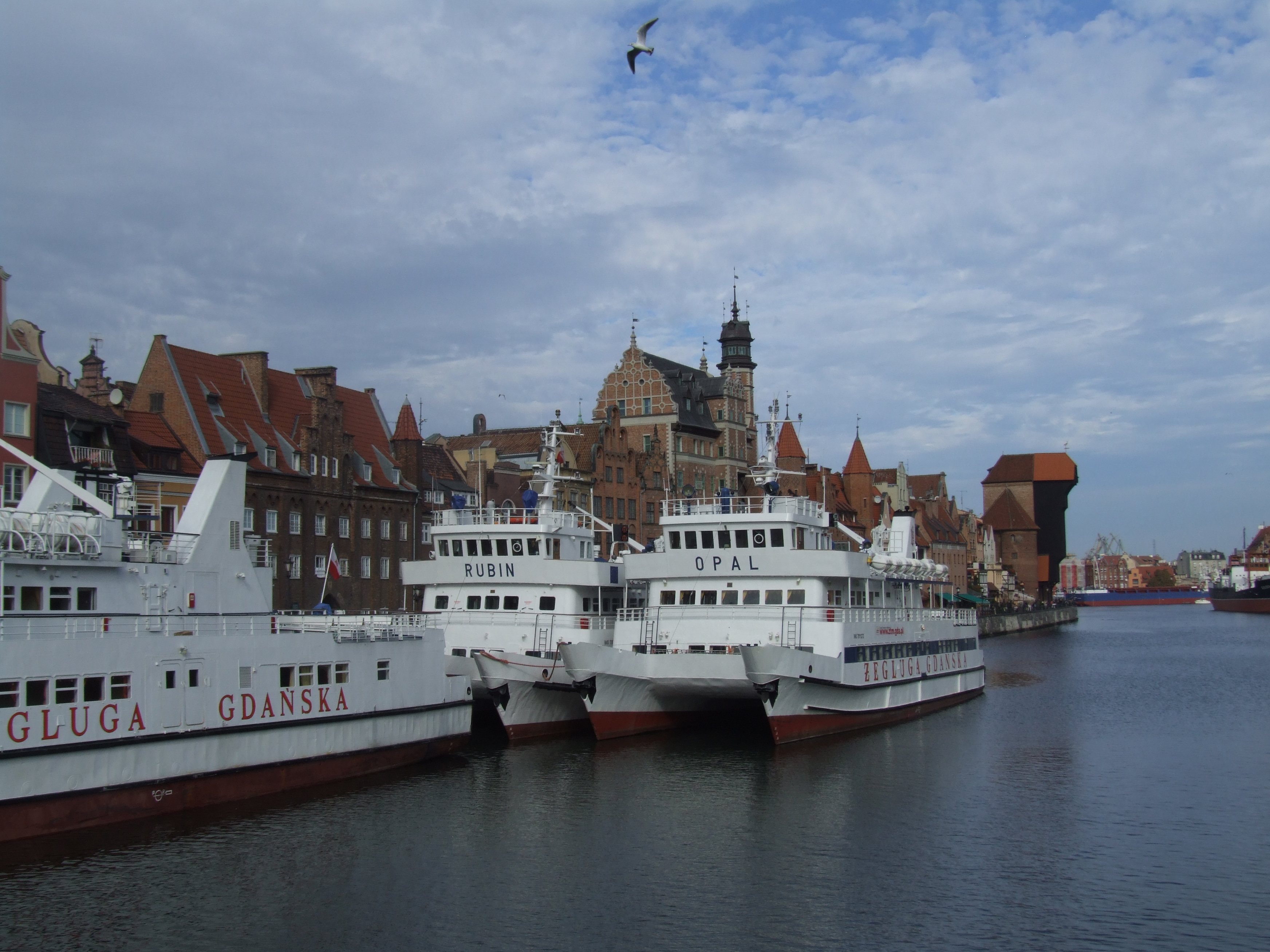 Gdańsk